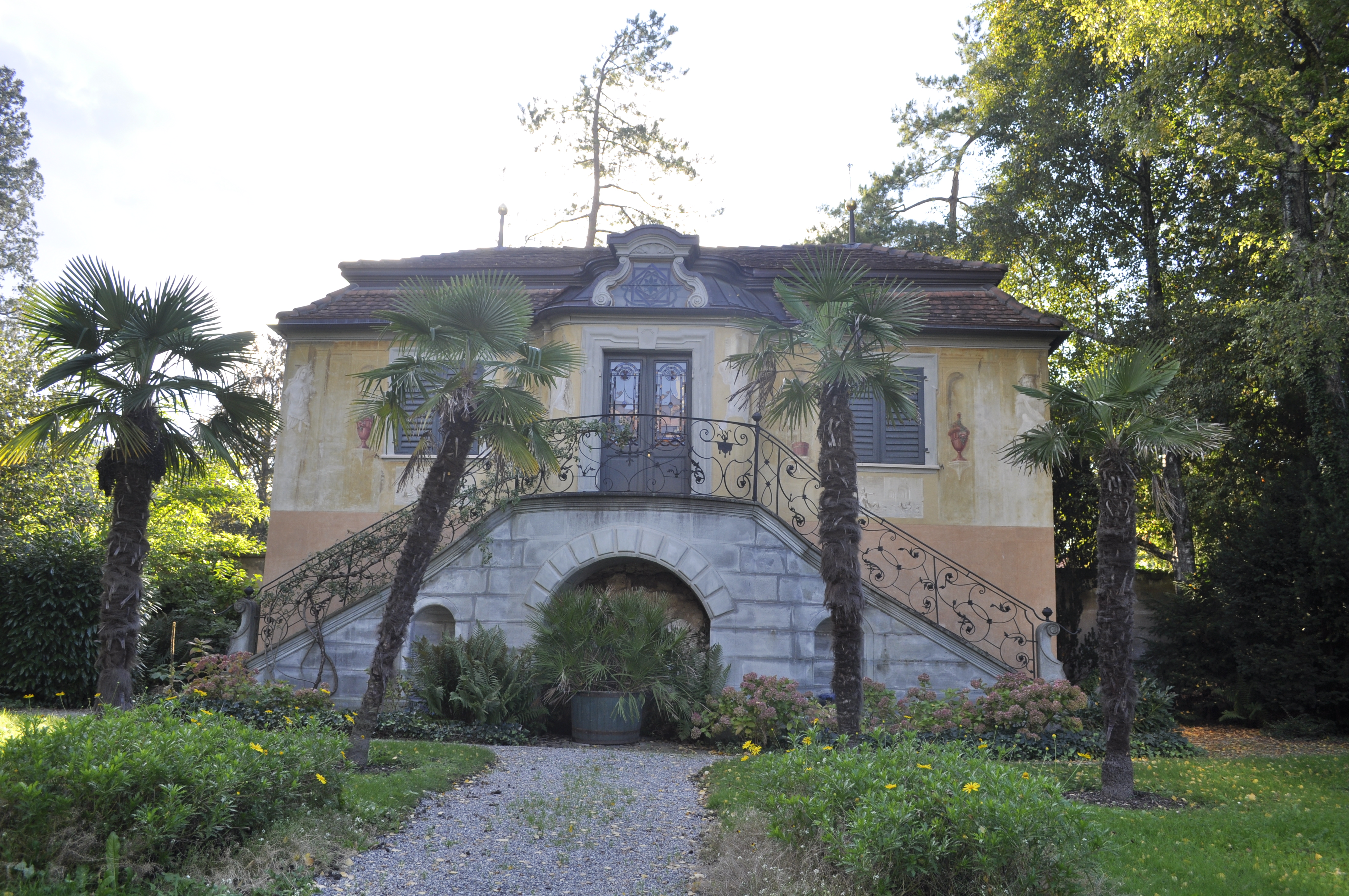 Löwenhof à Rheineck (47.4679 N 9.58667 E). la dependnace en face du batiment